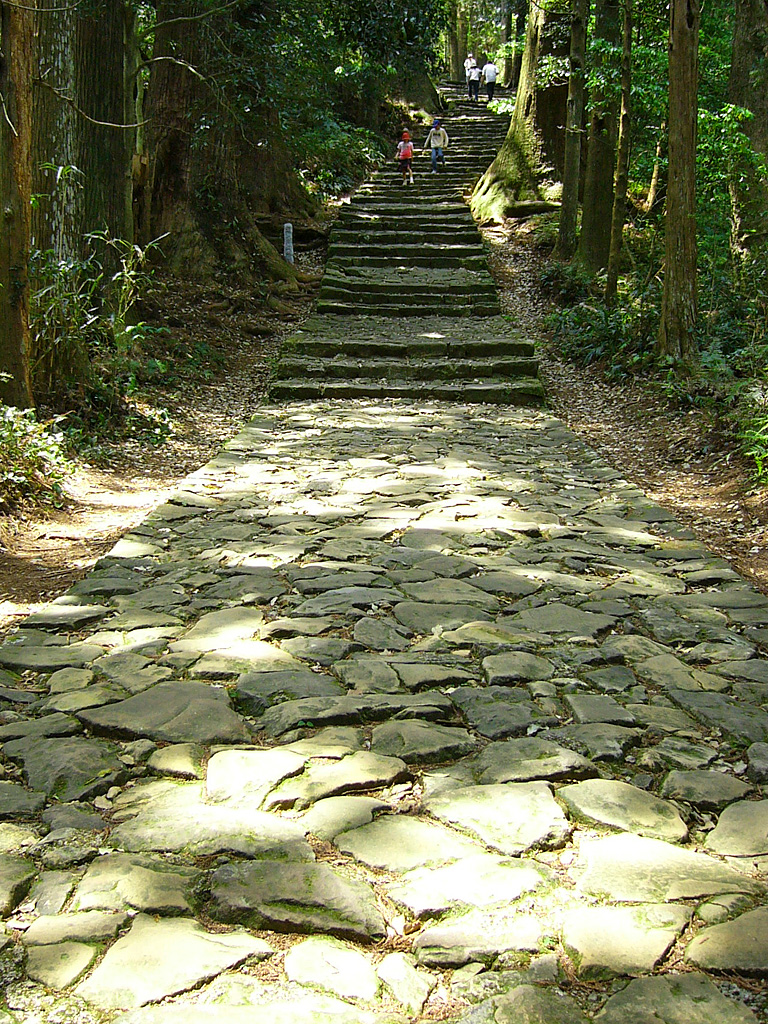 Daimonzaka in Nachikatsuura, Wakayama